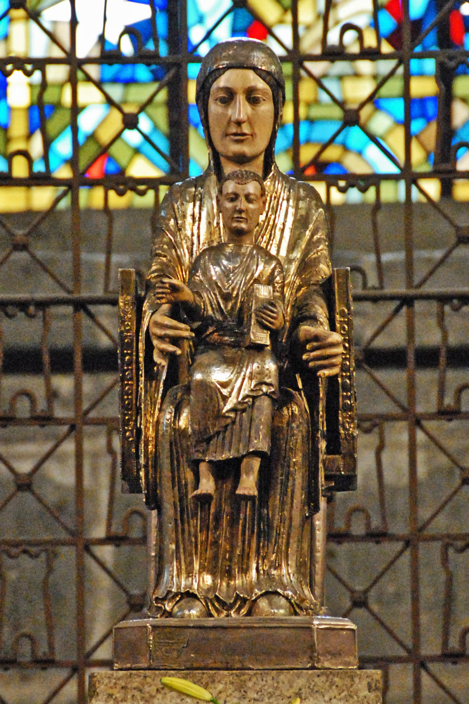 N.-D. d'Orcival, Madonna frontal